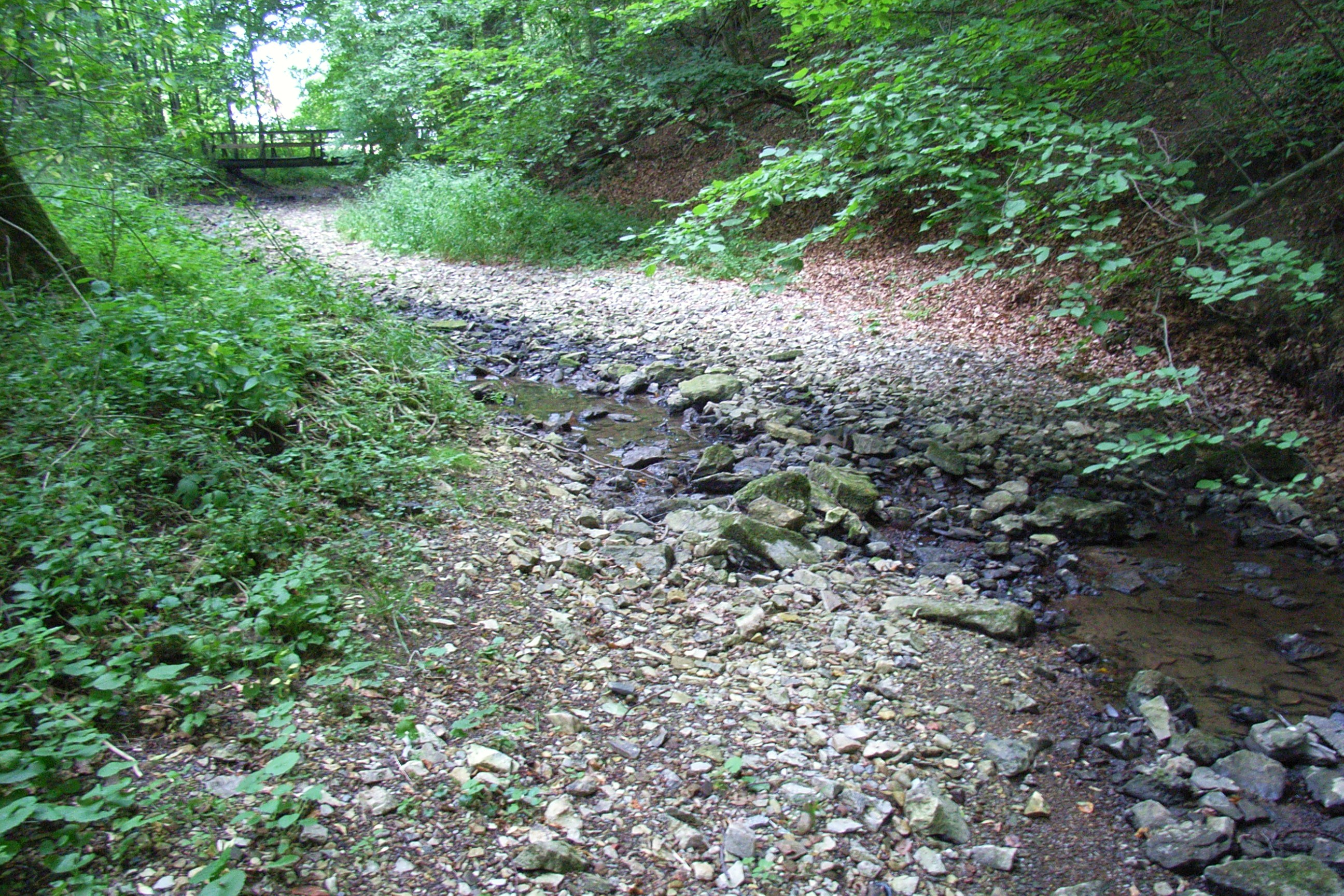 In einem trockenen Sommer versiegt der schwache Strom der Aa unterhalb von Reelsen für eine Weile im Geröll des Bachbettes. Wenige Meter weiter unterhalb des Bildes ist das Bachbett trocken. Noch oberhalb Alhausens ist der Strom dann wieder zu sehen. Blick stromaufwärts.